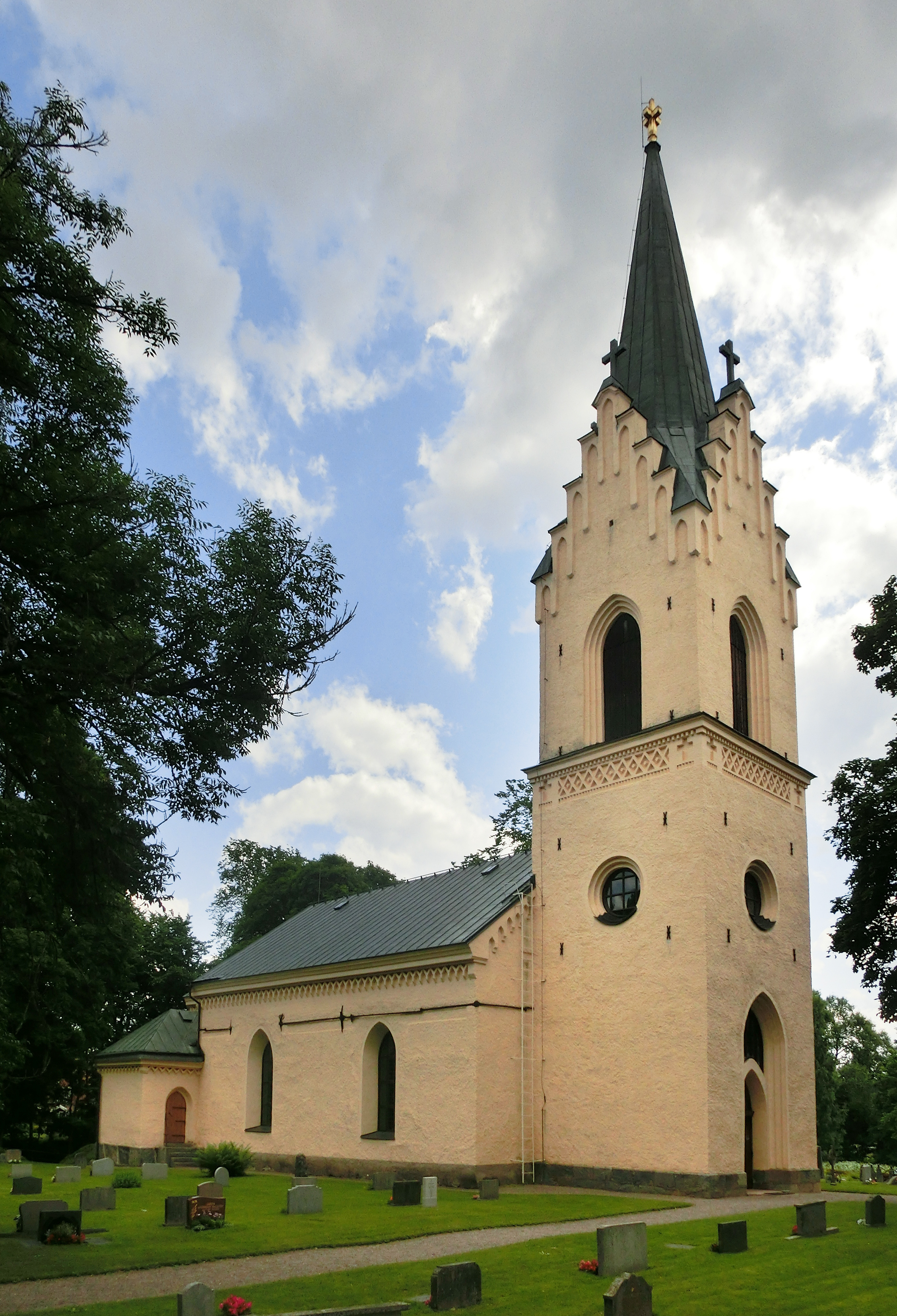 Enåkers kyrka i Enåkers socken, Heby kommun, Uppsala län, Uppland, Uppsala ärkestift, Sverige.